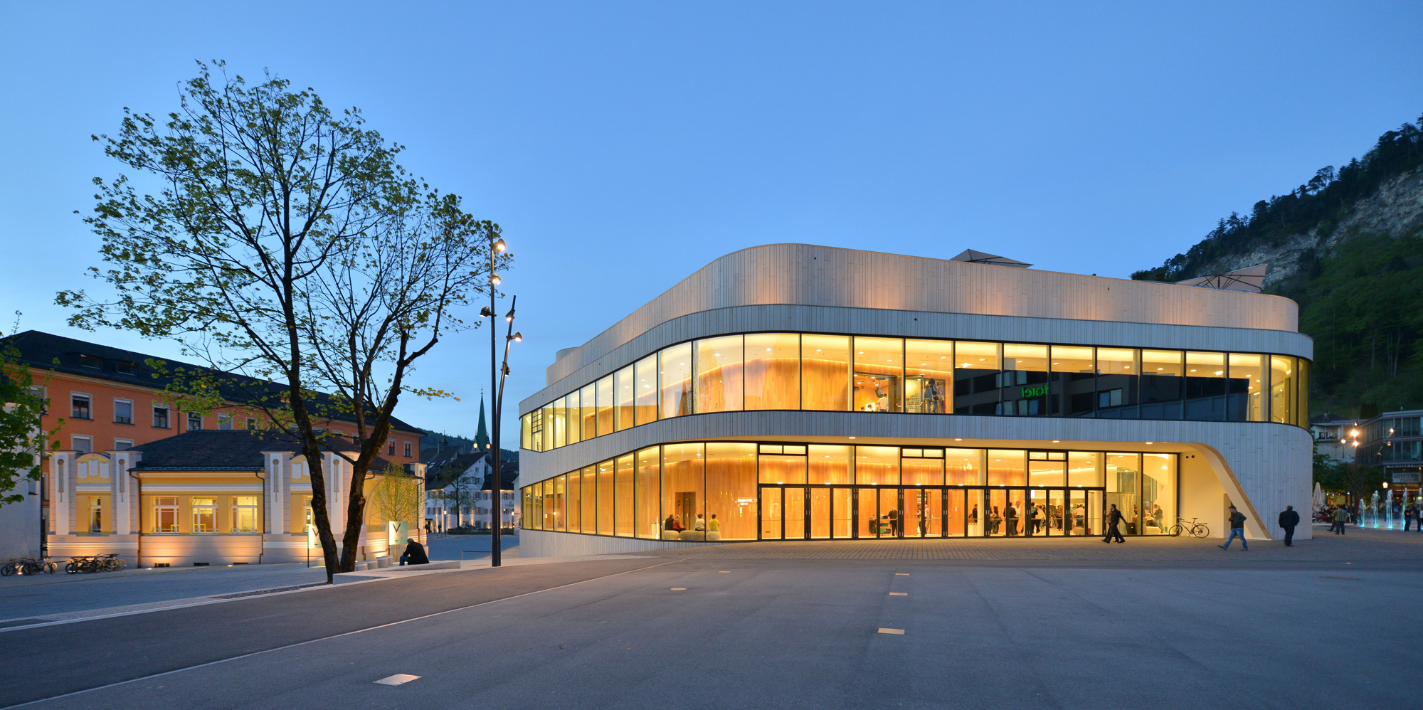 Das Kultur Kongresszentrum Montforthaus [1] in Feldkirch wurde nach Plänen von Hascher Jehle Architektur 2014 fertiggestellt und am 2. Januar 2015 feierlich eröffnet.